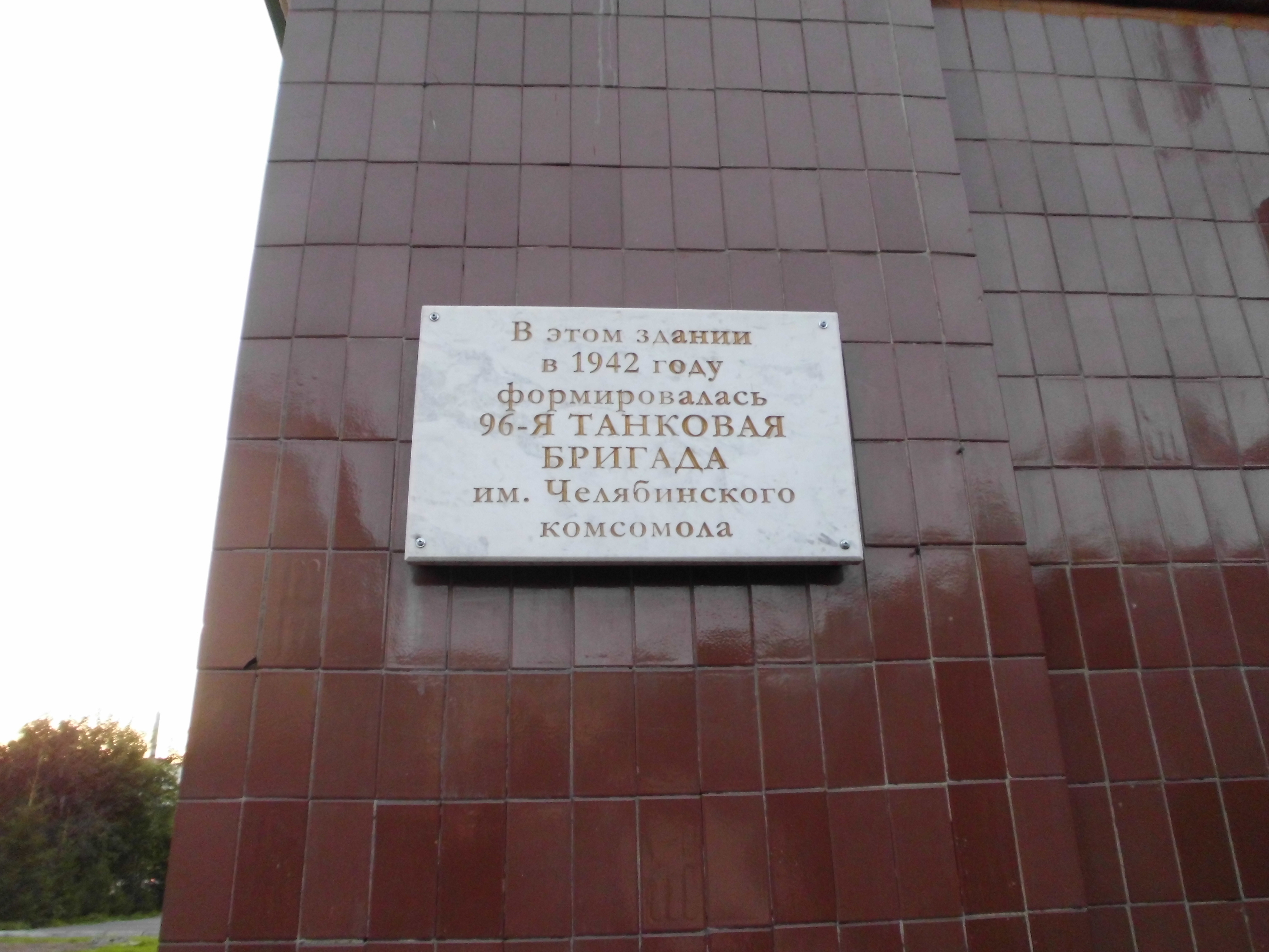 Здание, где была сформирована 96-я танковая бригада им. Челябинского комсомола: улица Овчинникова, 4, Челябинск, Челябинская область. В здании располагается средняя общеобразовательная школа № 53 города Челябинска. Памятная доска.